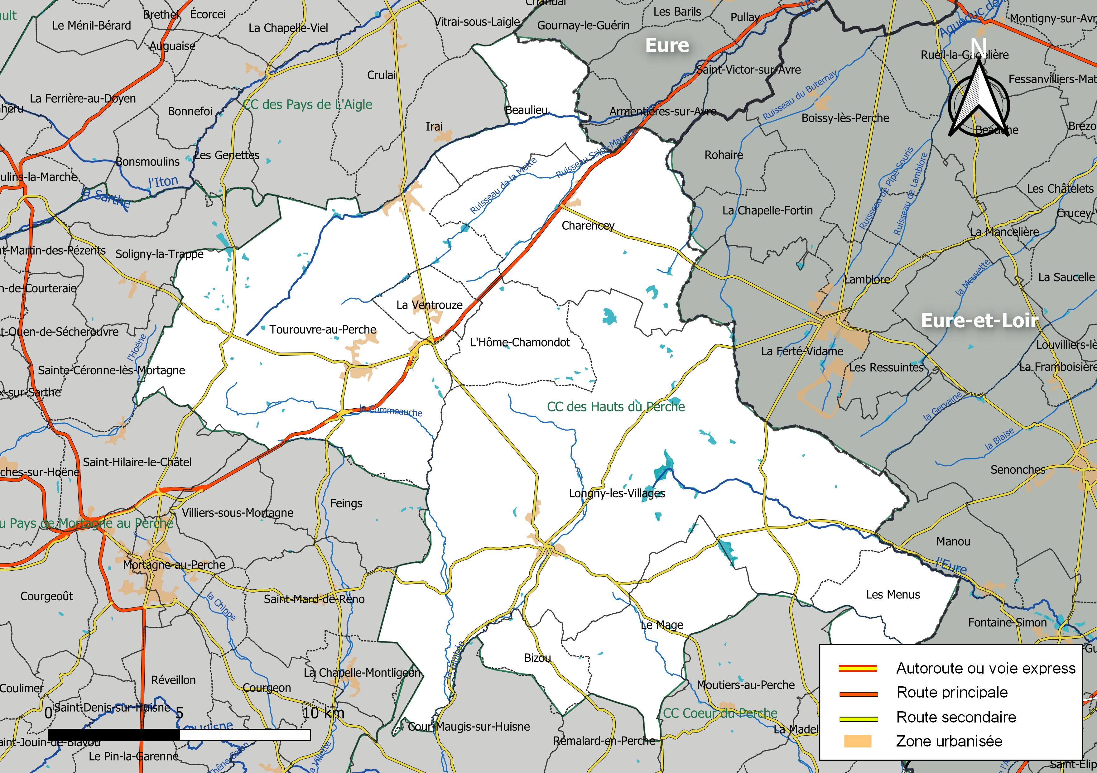 Carte géographique de la Communauté de communes des Hauts du Perche, département de l'Orne, France. Composition au 1er janvier 2019.